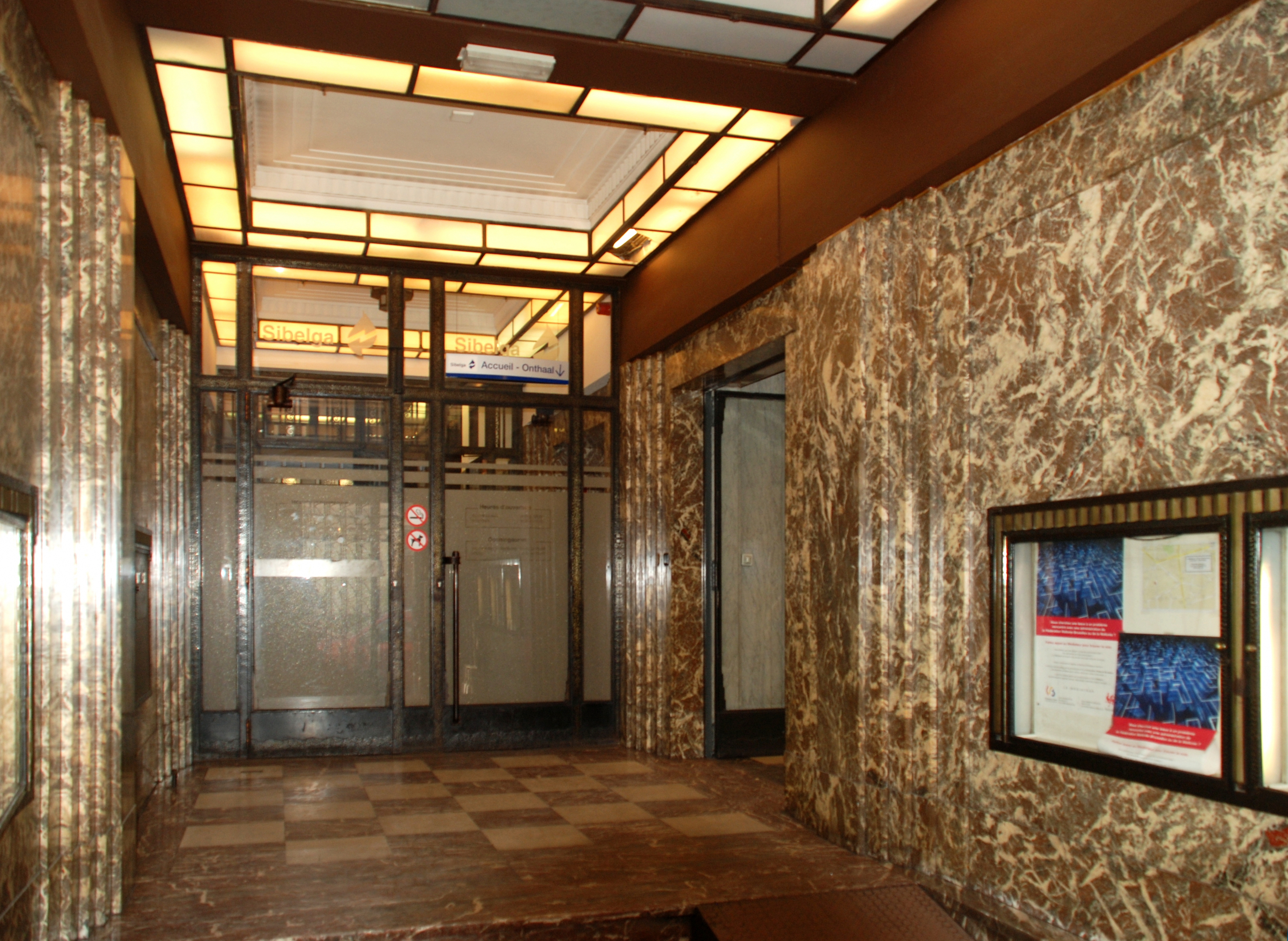 Belgique - Bruxelles - Ancien siège de la Banque Agricole de Belgique